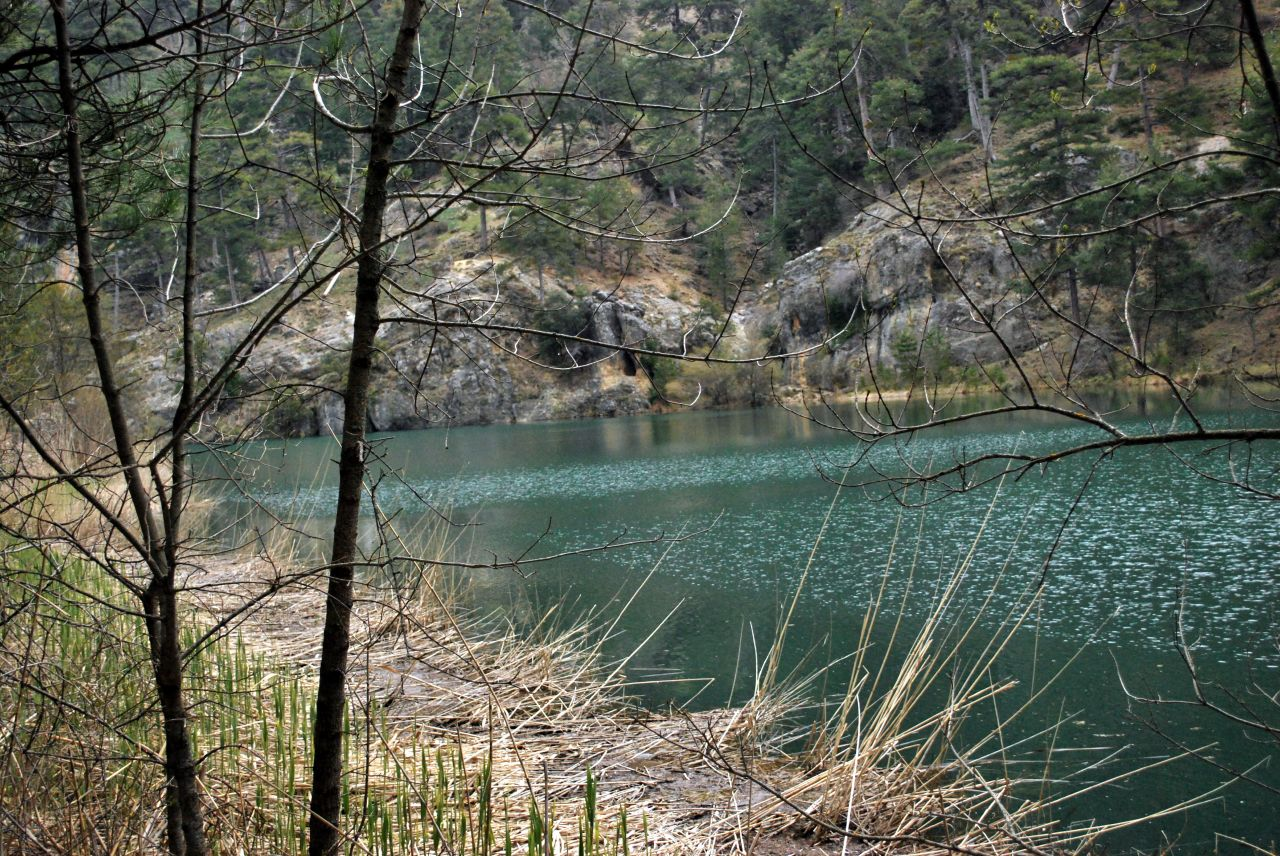 Río Guadalquivir en el Parque Natural de las Sierras de Cazorla Segura y las Villas. Jaén (España).